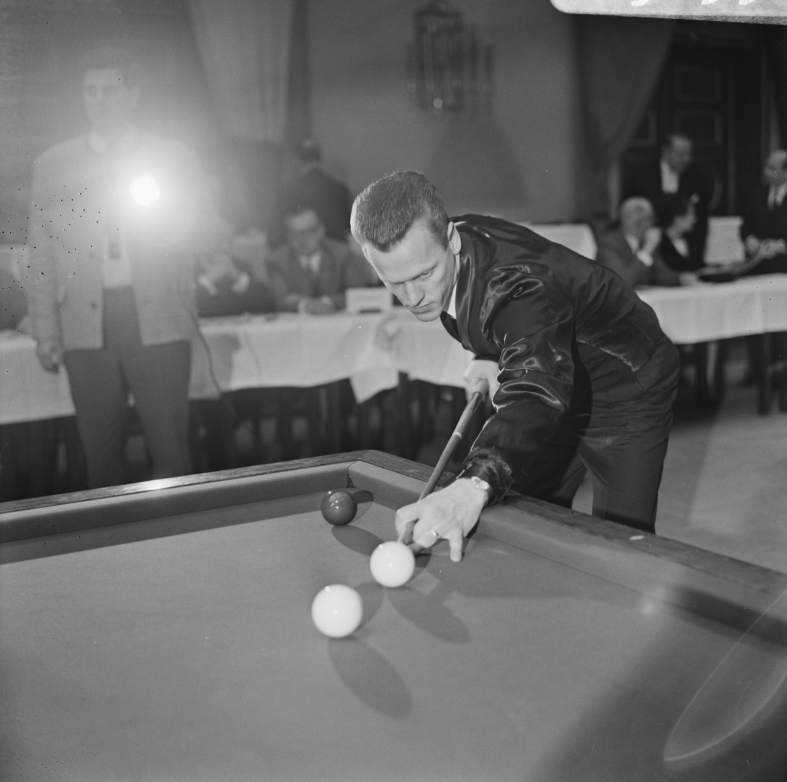 Collectie / Archief : Fotocollectie Anefo Reportage / Serie : [ onbekend ] Beschrijving : Europese Kampioenschappen Bandstoten in Krefeld, Vultink (Nederland) Datum : 21 april 1966 Locatie : Krefeld Trefwoorden : KAMPIOENSCHAPPEN, bandstoten Fotograaf : Koch, Eric / Anefo Auteursrechthebbende : Nationaal Archief Materiaalsoort : Negatief (zwart/wit) Nummer archiefinventaris : bekijk toegang 2.24.01.03 Bestanddeelnummer : 919-0552